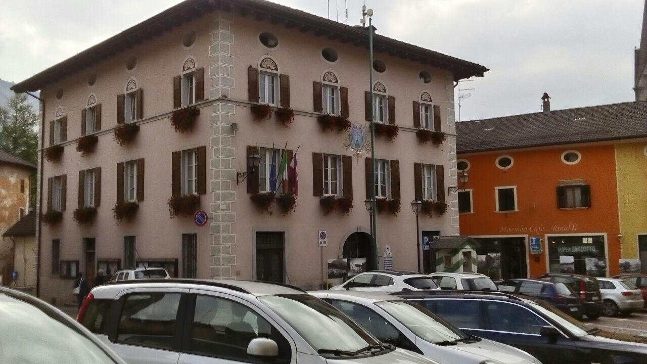 Municipio di Strigno - comune di Castel Ivano This is a photo of a monument which is part of cultural heritage of Italy.